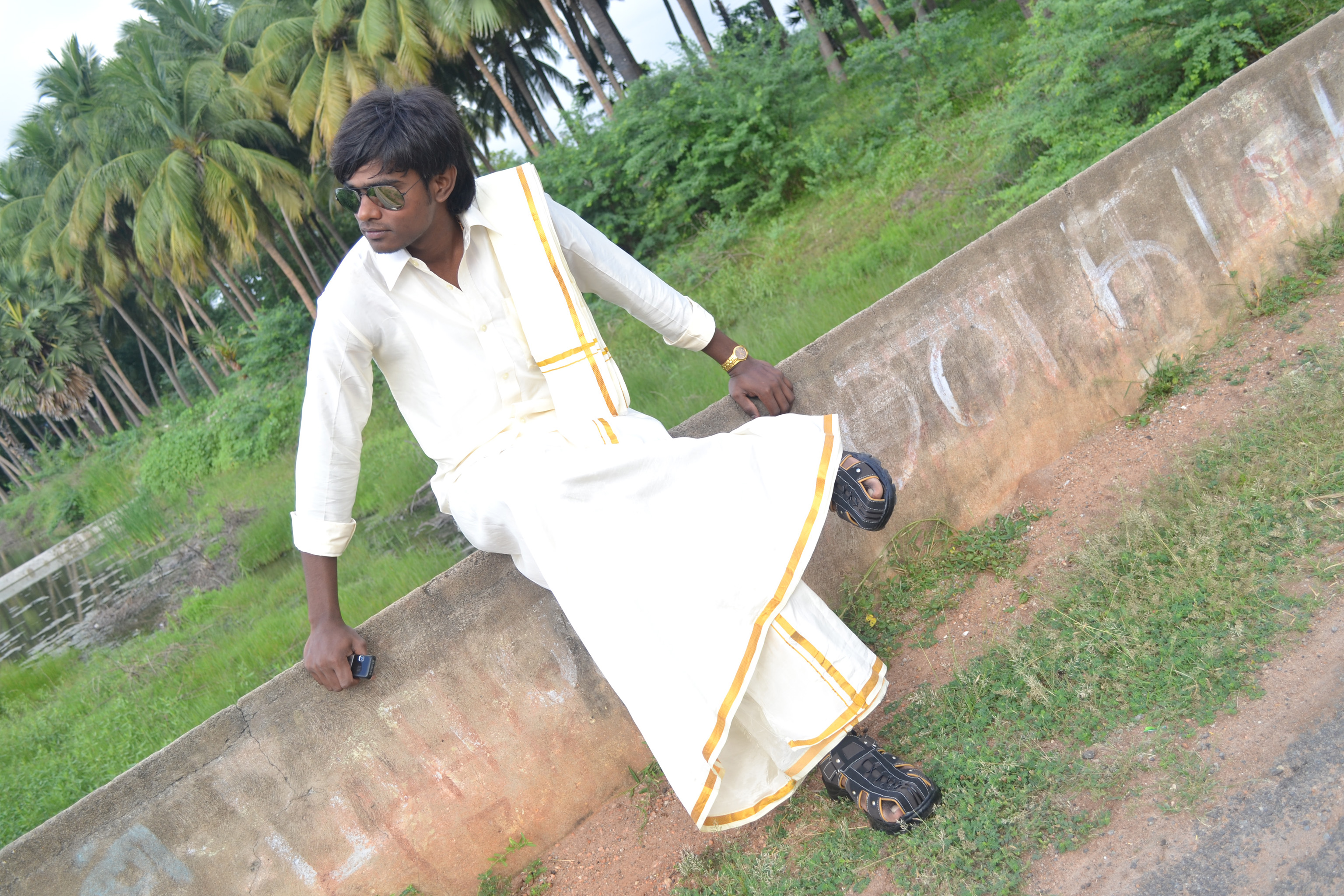 கிராமத்து சுட்டுசூலல்